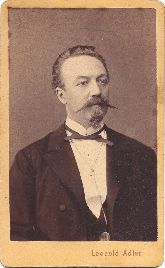 fotograf Leopold Adler